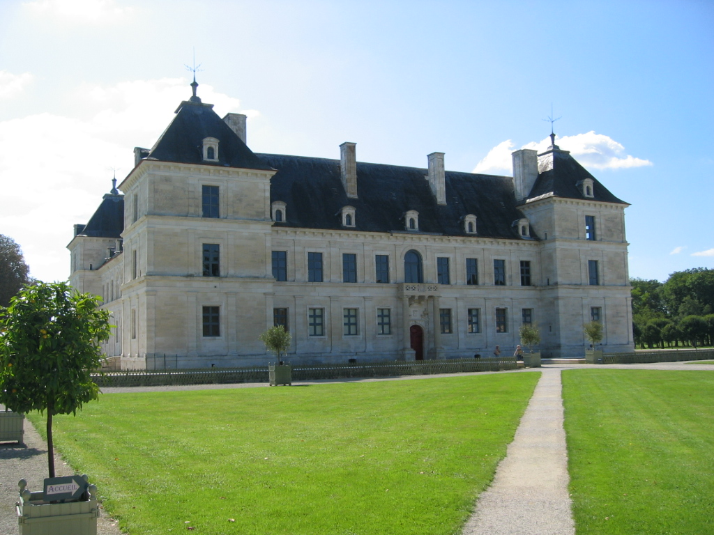 Château d'Ancy-le-Franc France